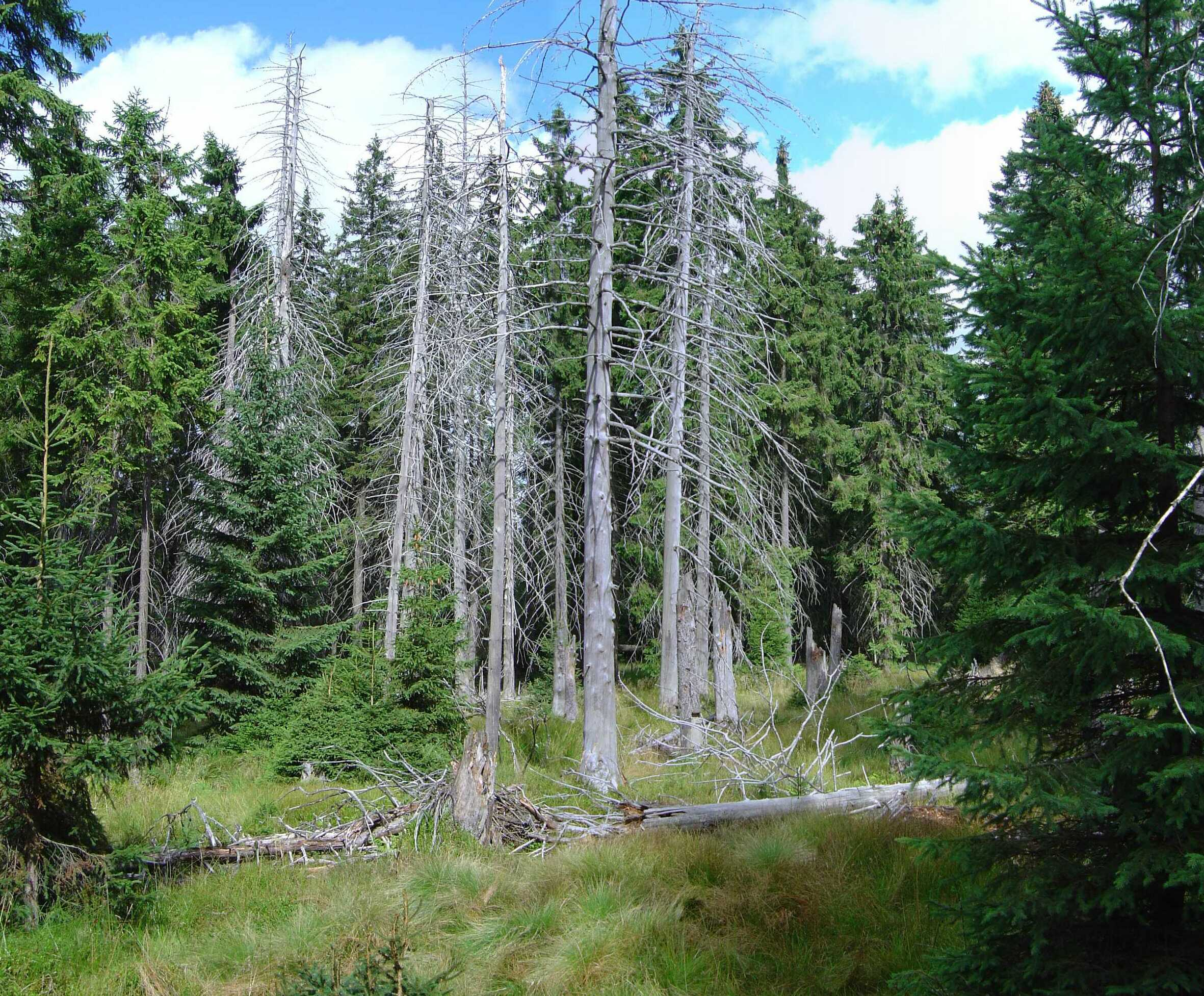 Location: Czech Republic, Boží Dar, 50°24'34.48"N,12°54'13.64"E, 998 m n.m. [1] Special Areas of Conservation NATURA 2000: CZ0414110 - Krušnohorské plató [2] Nature reserve: NPR Božídarské rašeliniště Habitat: Podmáčená smrčina, malá disturbance způsobená namnožením lýkožrouta smrkového Ips typographus na několika zlomených smrcích Picea abies. NATURA 2000: 9410 Acidophilous spruce forests (Vaccinio-Piceetea) [3] EUNIS: G3.E6 - Nemoral bog [Picea] woods [4] Katalog biotopů ČR: L9.2B - Podmáčené smrčiny [Acidophilous spruce forests (Vaccinio-Piceetea)] [5]